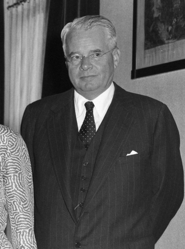 Oud-president Truman ontvangen door koningin Juliana op Paleis Soestdijk. Vlnr. Koningin Juliana, de heer Woodword, Harry Truman, mevr. Woodword, mevr. Truman, de Amerikaanse ambassadeur Freeman Mathews